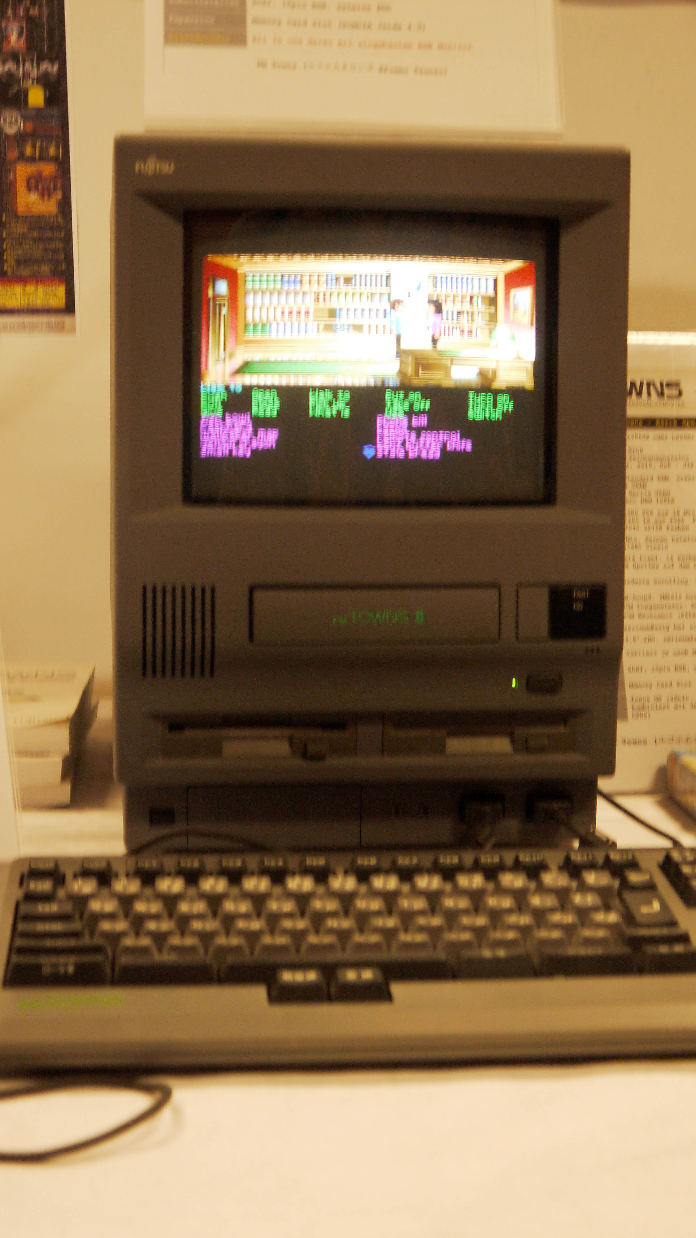 FM Towns II